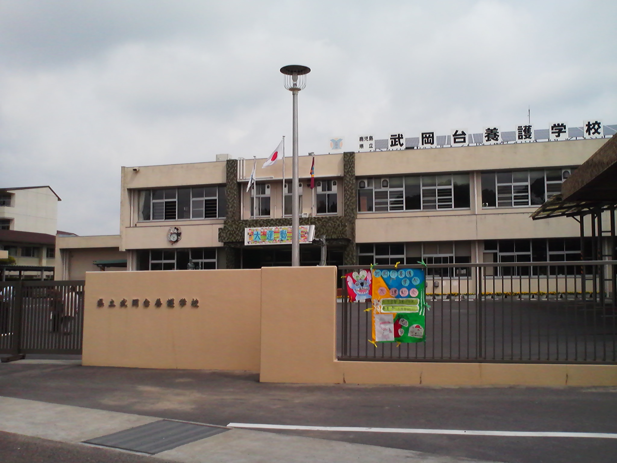 鹿児島県立武岡台養護学校の外観